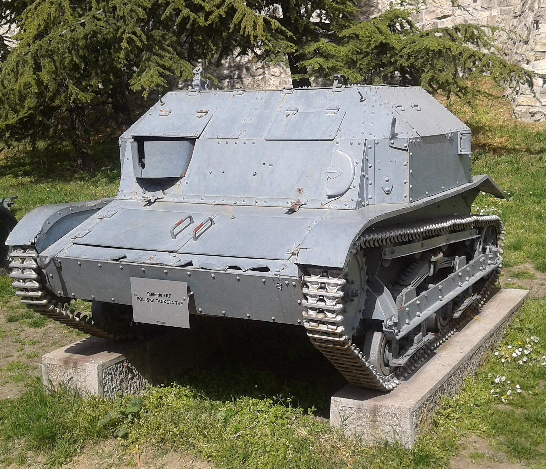 Panzer (Tankette TKF) in der frei zugänglichen äußeren Ausstellung des Militärmuseums Belgrad (Serbien)